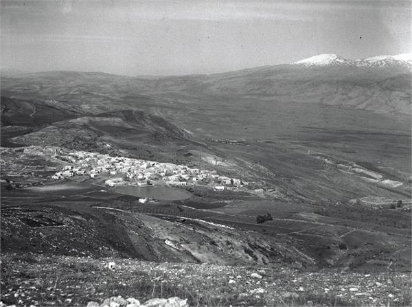 החולה - הגליל העליון ובקעת החולה.